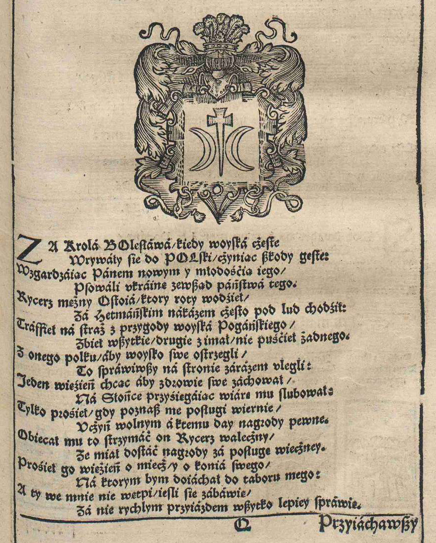 Fragment strony 301 z książki B. Paprockiego, Gniazdo cnoty, skąd herby Rycerstwa sławnego Królestwa Polskiego, Wielkiego Księstwa Litewskiego, Ruskiego, Pruskiego, Mazowieckiego, Żmudzkiego i inszych Państw do tego Królestwa należących, Książąt i Panów początek swój mają. Kraków: 1578. Wydawca: Piotrkowczyk, Andrzej (15..-1620)